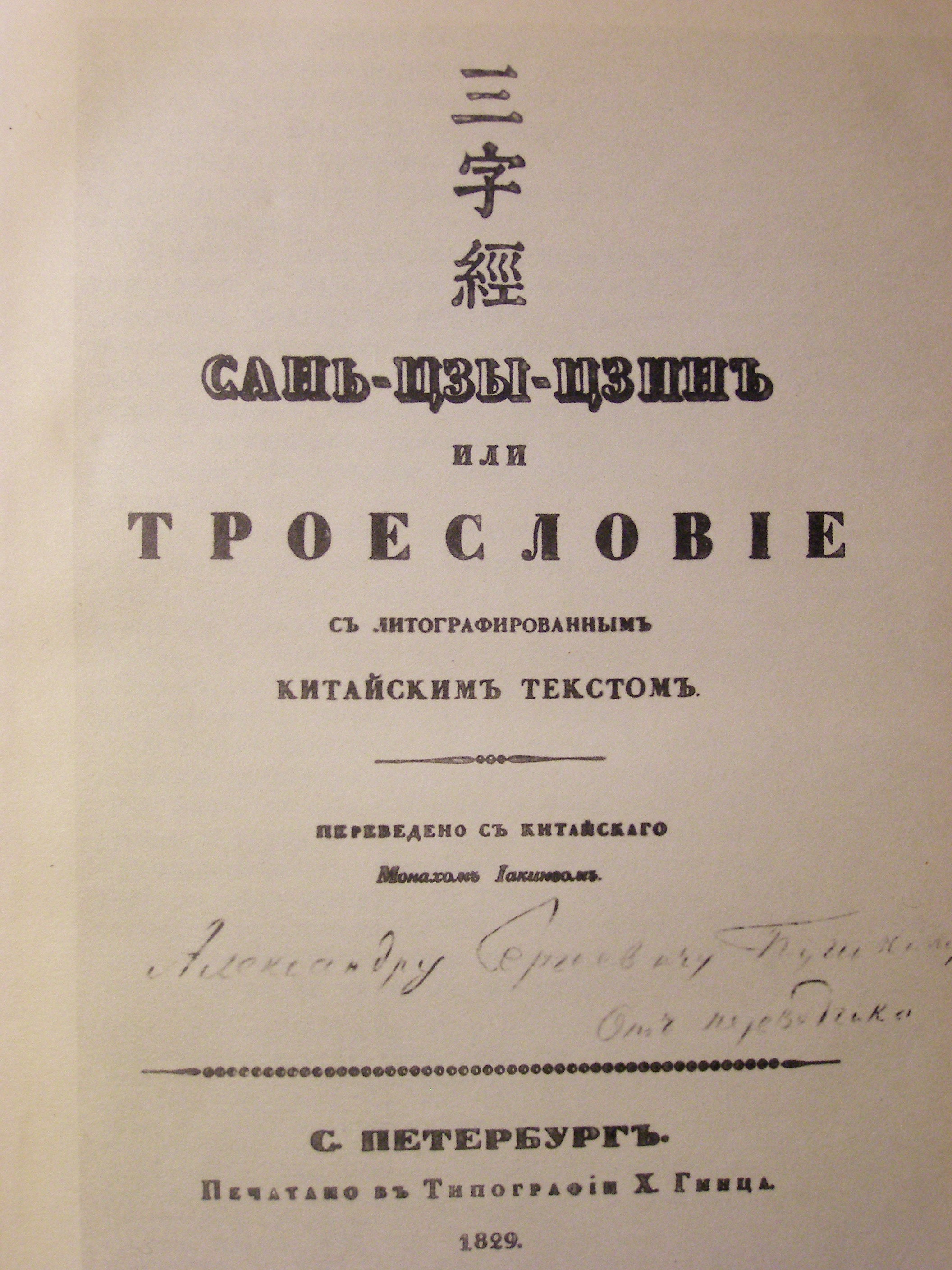 Титульный лист "Троесловия" с автографом переводчика: дарственной надписью А.С. Пушкину